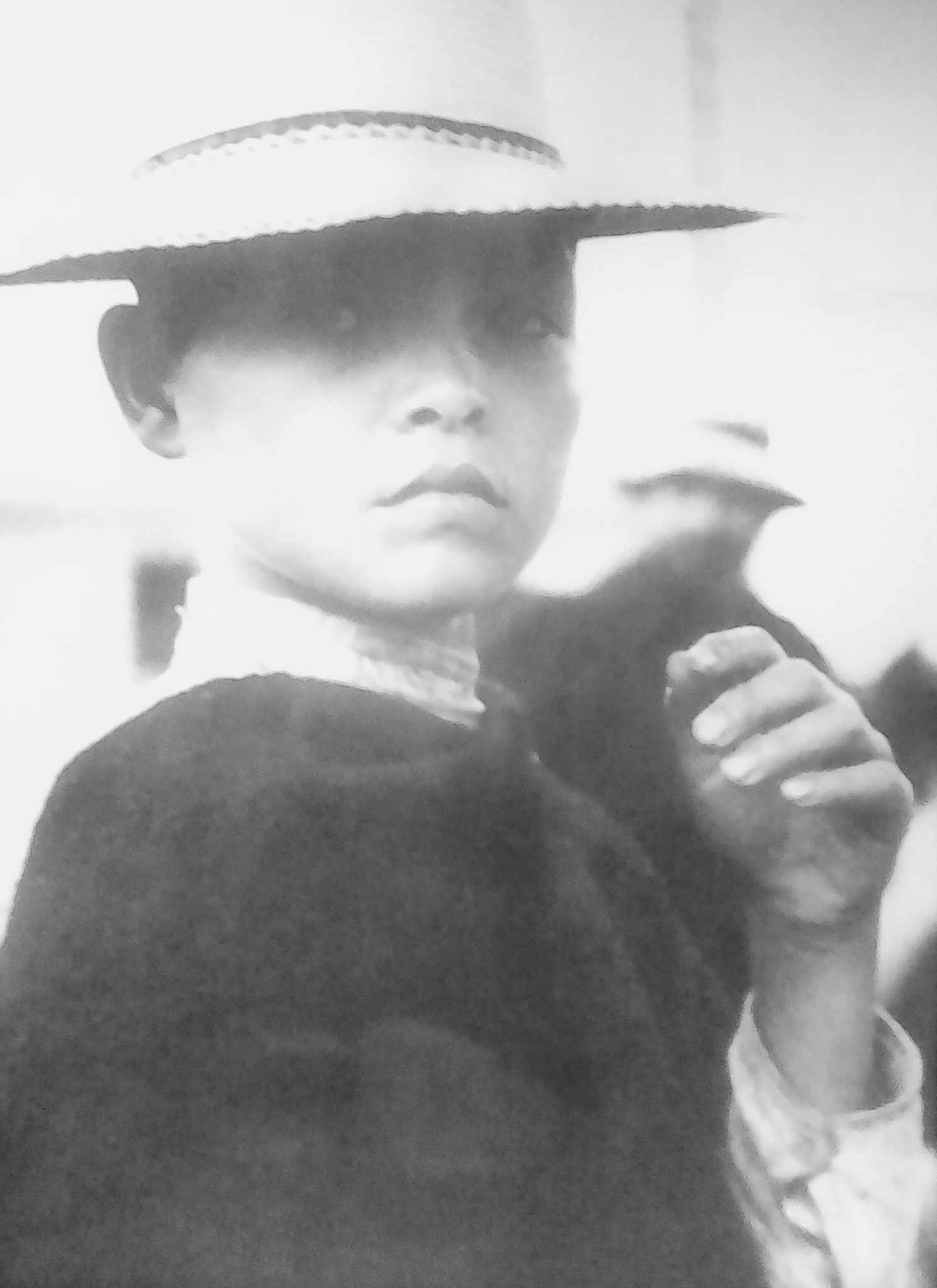 Niño muisca fotografiado por Luis Benito Ramos en 1935, en el departamento de Boyacá.